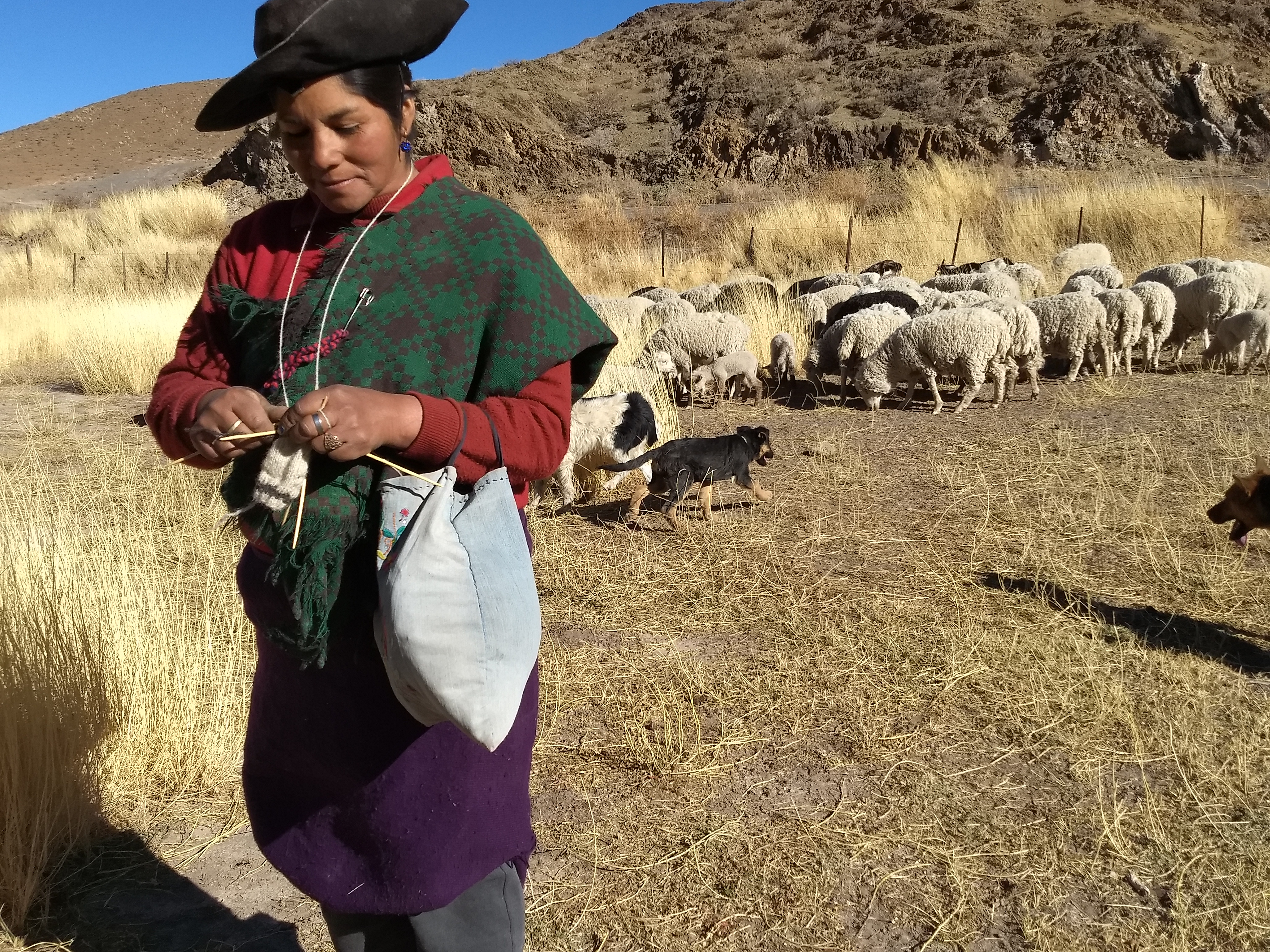 cultural. Lugares